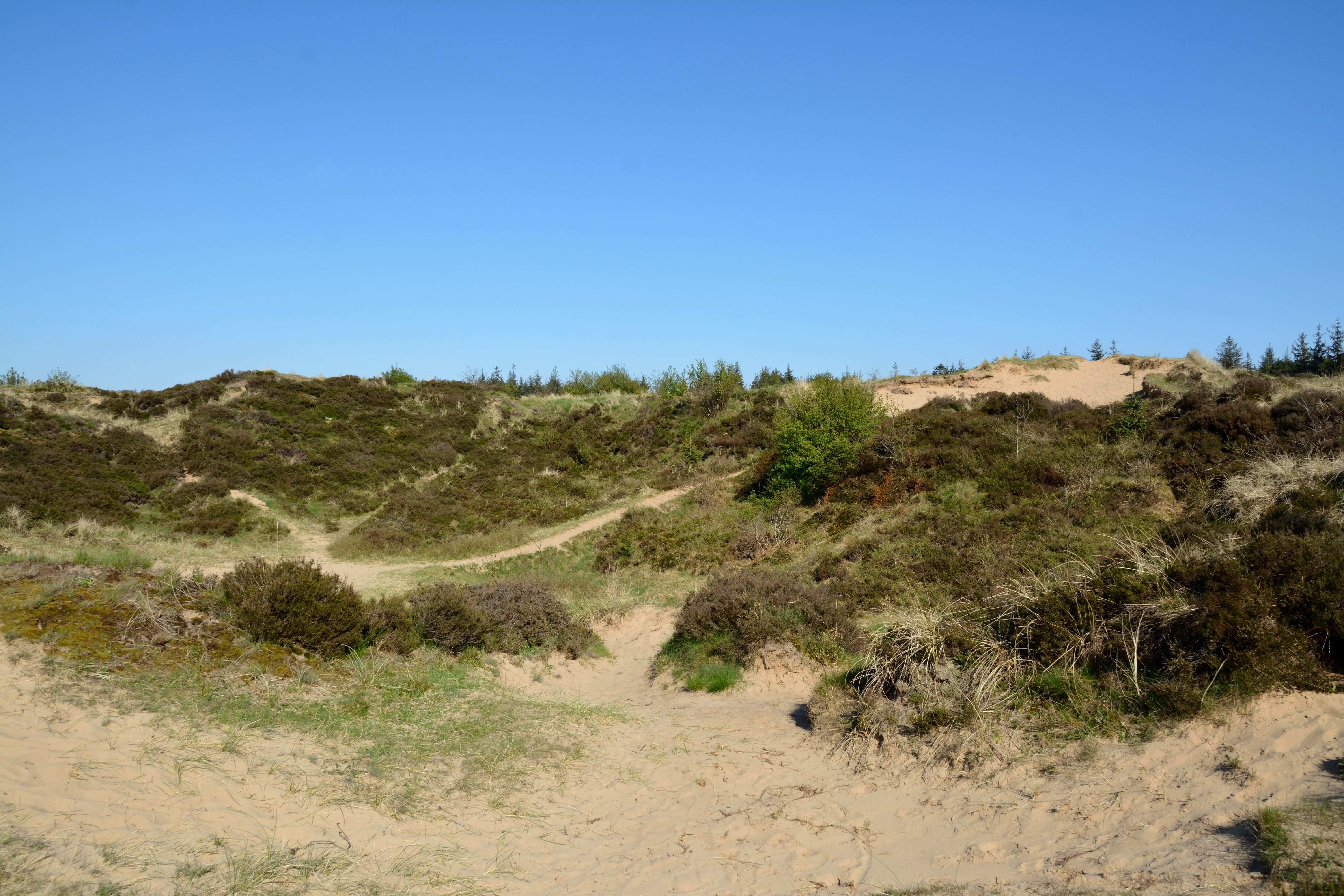 Impressionen aus dem Naturschutzgebiet "Süderlügumer Binnendünen" in Süderlügum